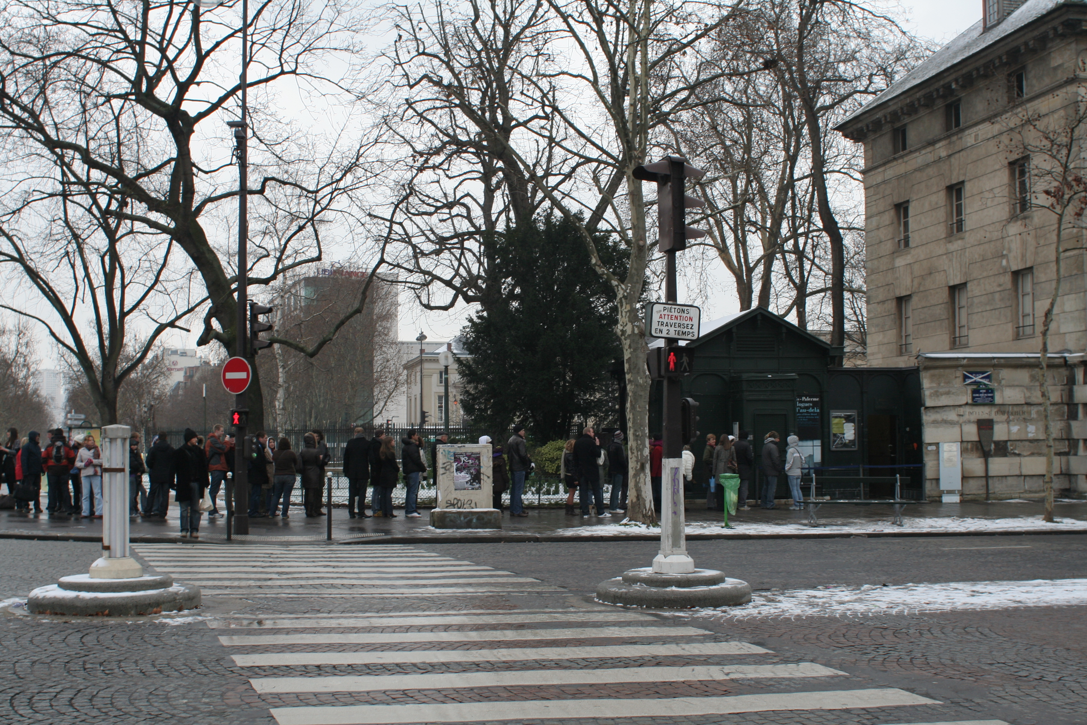 Pavillon est de la Barrière d'Enfer, Avenue du Colonel-Henri-Rol-Tanguy, XIVe arrondissement, ParisFile d'attente pour l'entrée des carrières (Catacombes). Derrière s'étend le petit square de l'Abbé-Migne.